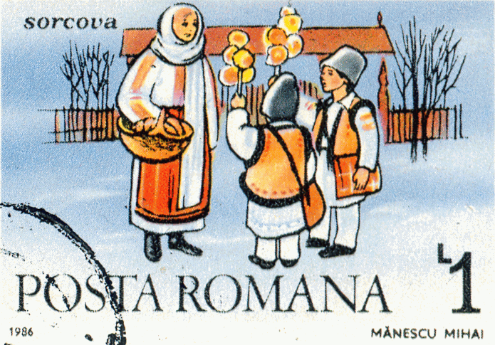 Sorcova, 1986, Mănescu Mihai Source: Post of Romania